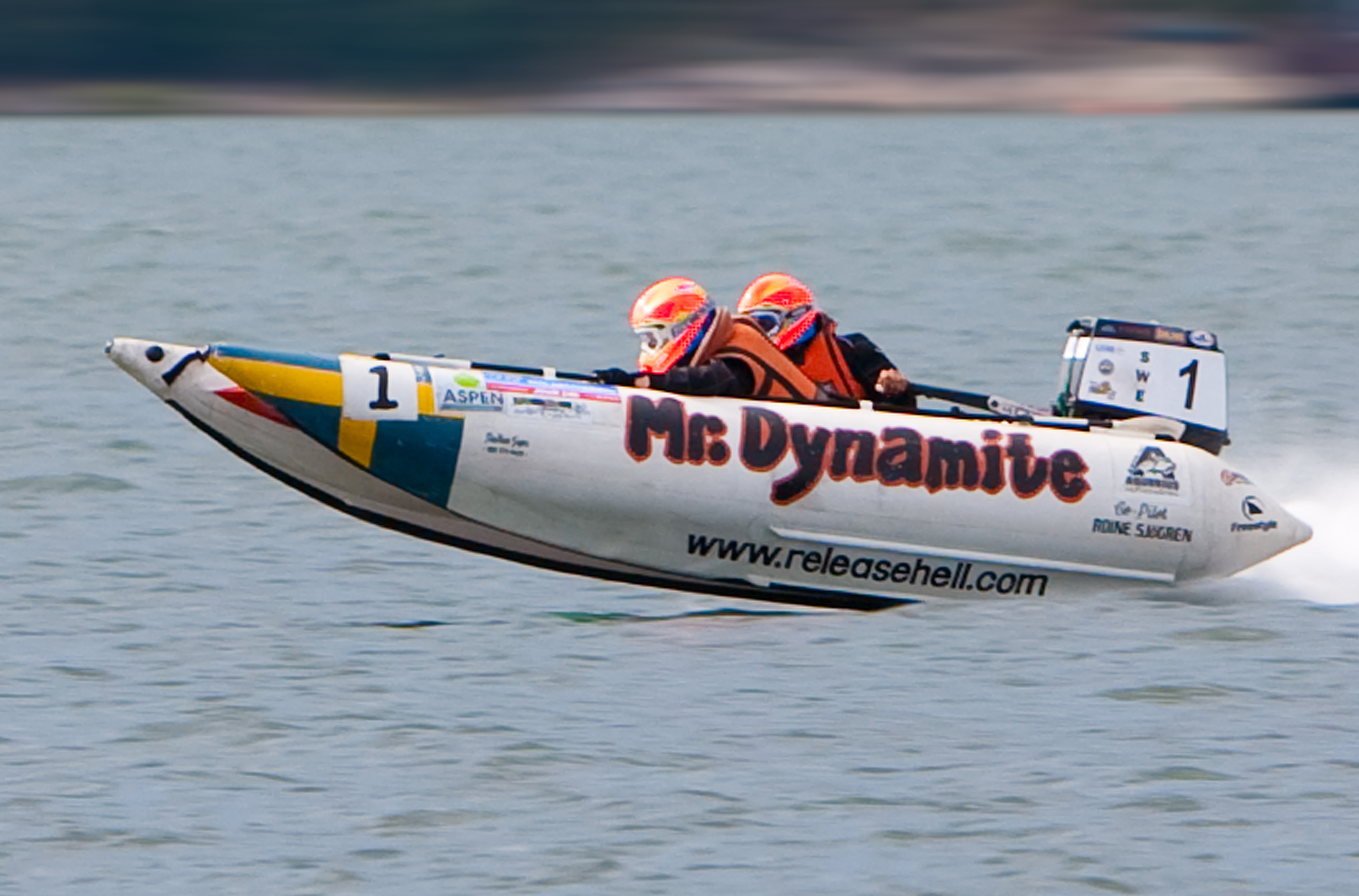 Roslagsloppet 2010